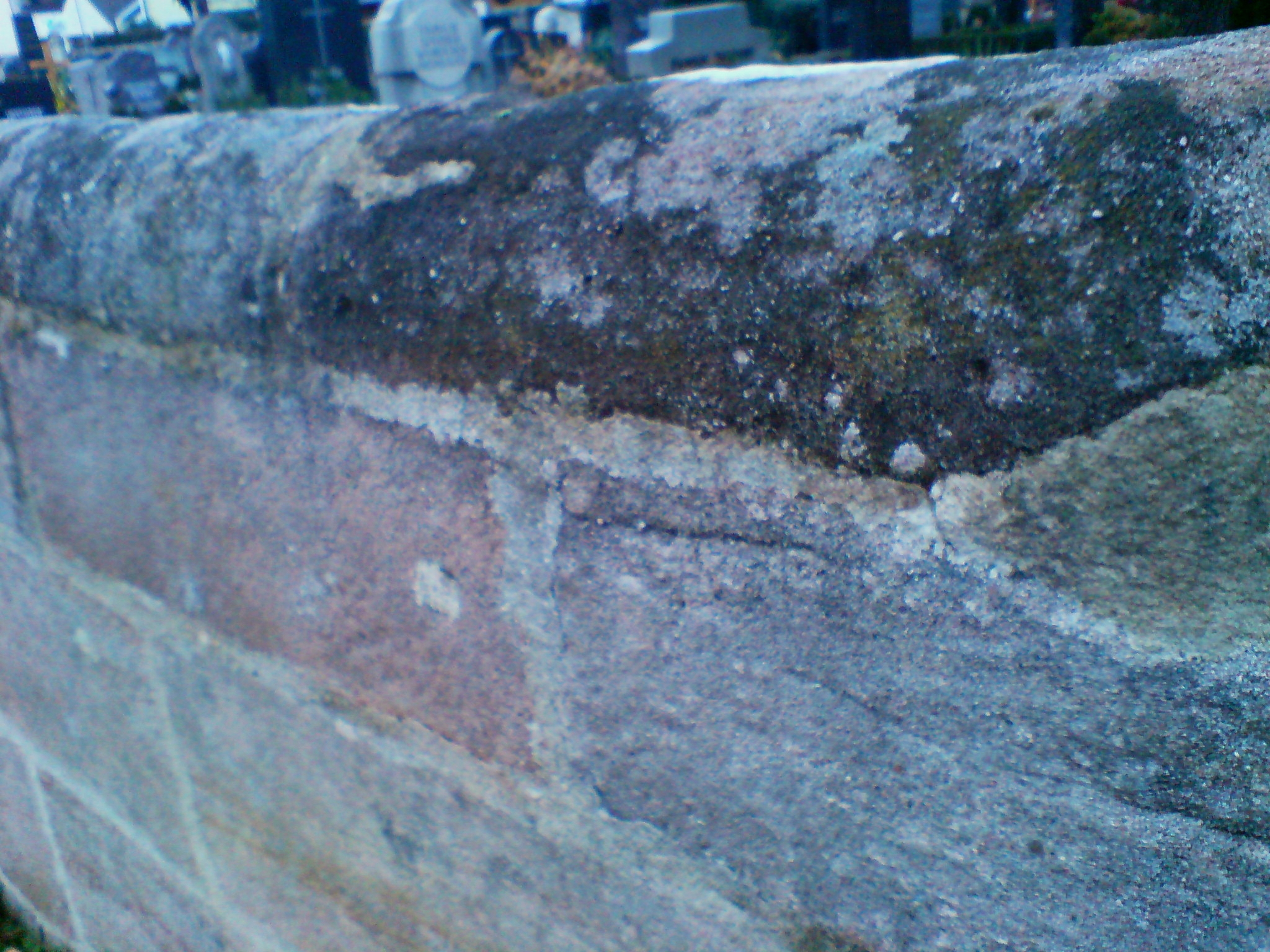 Friedhofsmauer_1